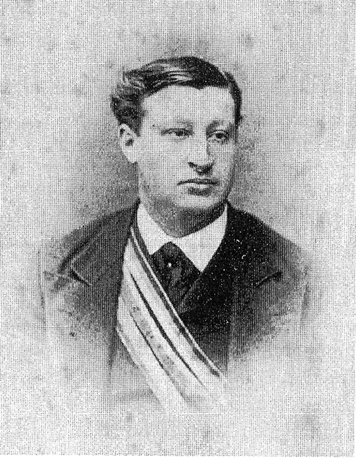 Porträt des Corpsstudenten Waldemar Dyhrenfurth (ca. 1849 - 1899), Schöpfer des Bonifazius Kiesewetter